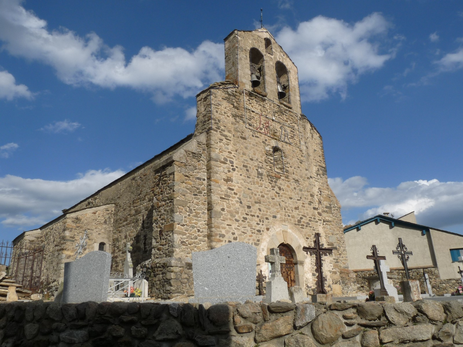 Eglise de Villeneuve, Angoustrine-Villeneuve-des-Escaldes, P.O., France